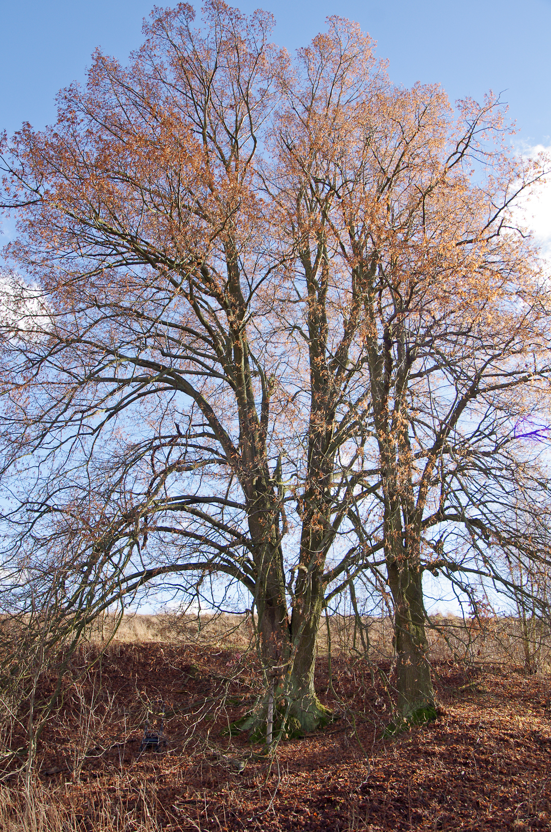 památné stromy -Hřebenské lípy, Hřebeny, okres Sokolov